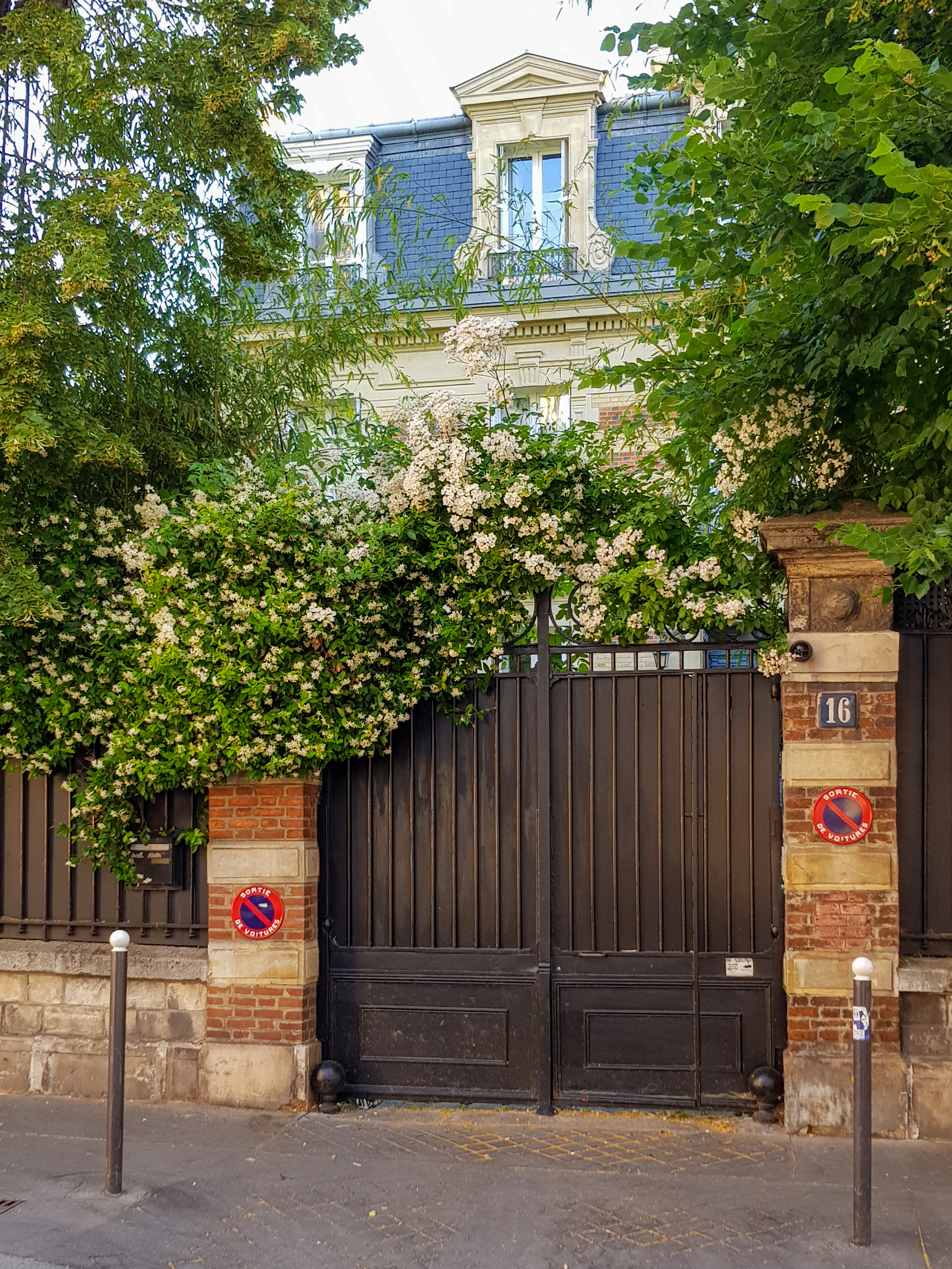 16, rue Poussin, Paris 16e.